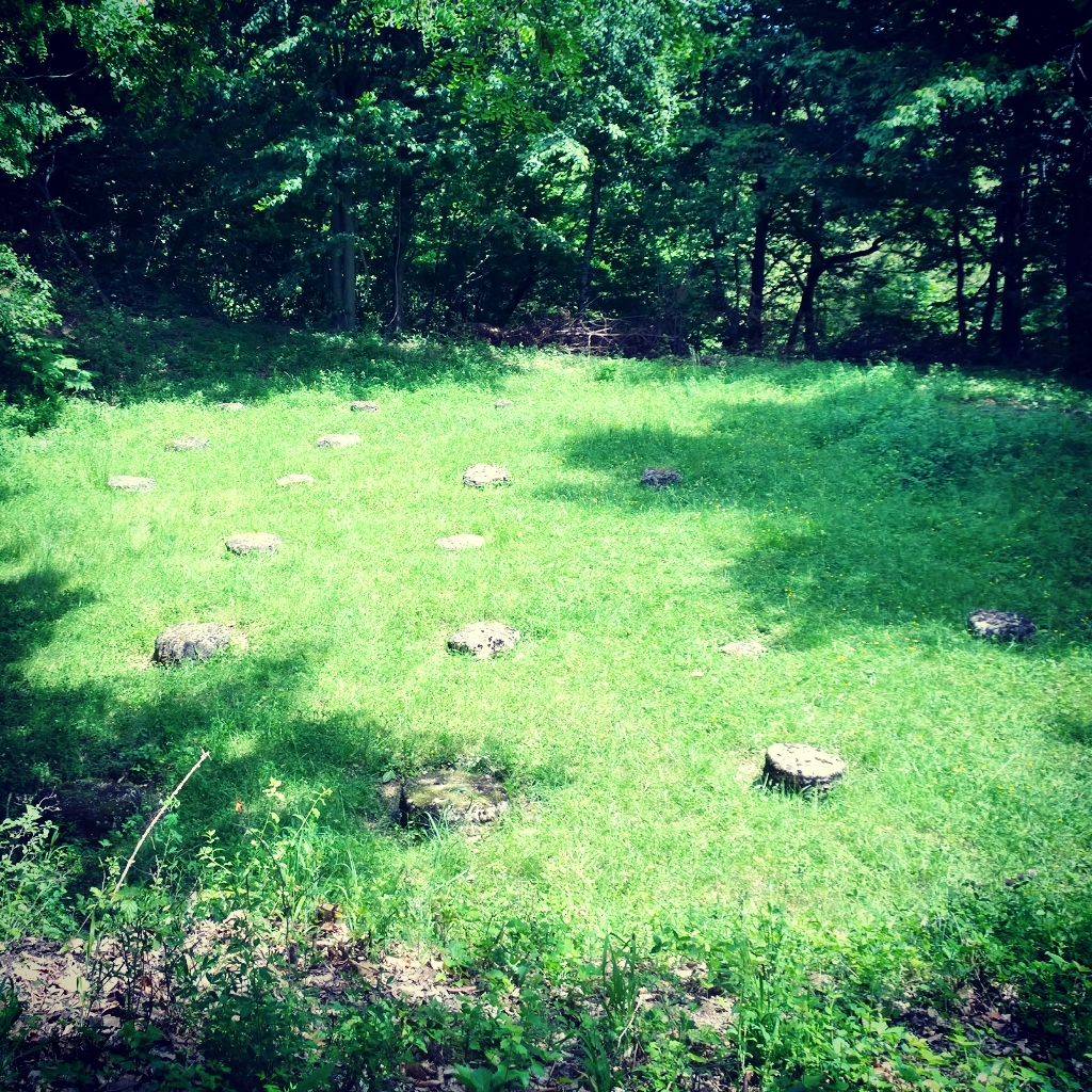 Sanctuare 01